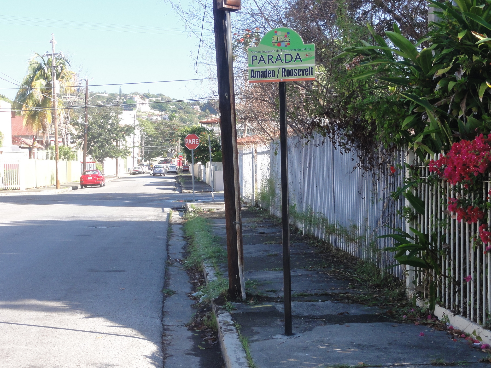 SITRAS - Letrero Parada Ruta Anaranjada, en Ponce, Puerto Rico. Castillo Serrallés es visible en el fondo.